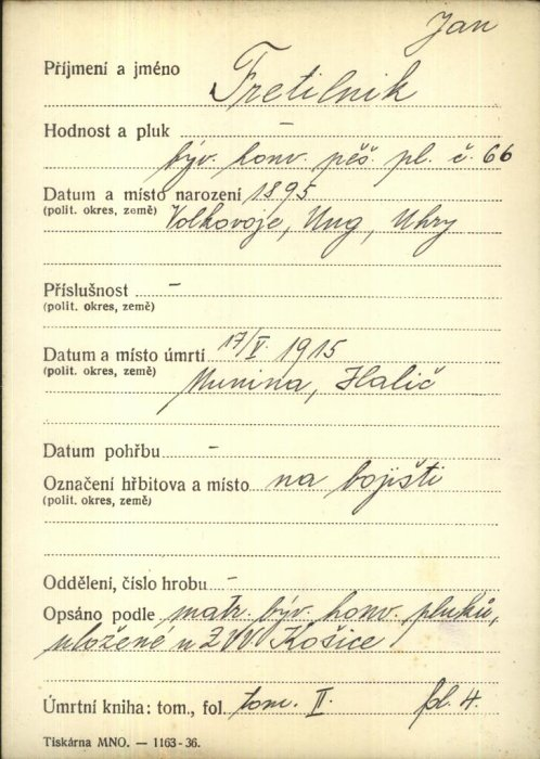 картка військового архіву Праги. (Вовкове )